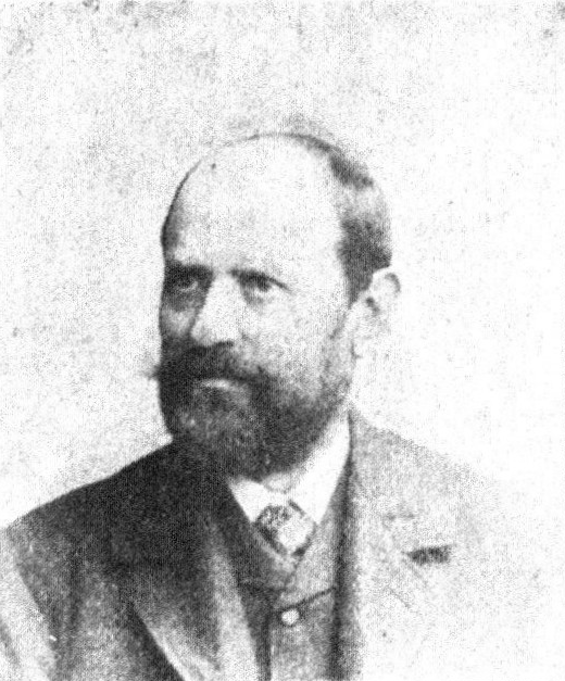 Österreichischer Politiker, Reichsratswahl 1907, Name siehe Dateiname